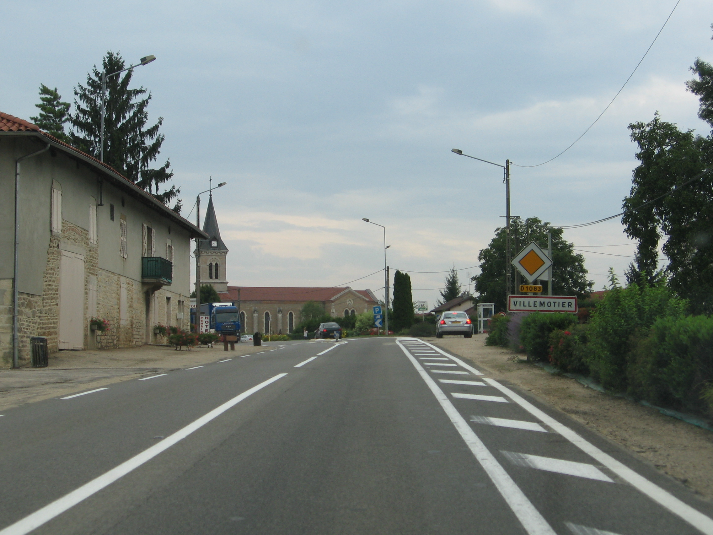 Villemotier, France